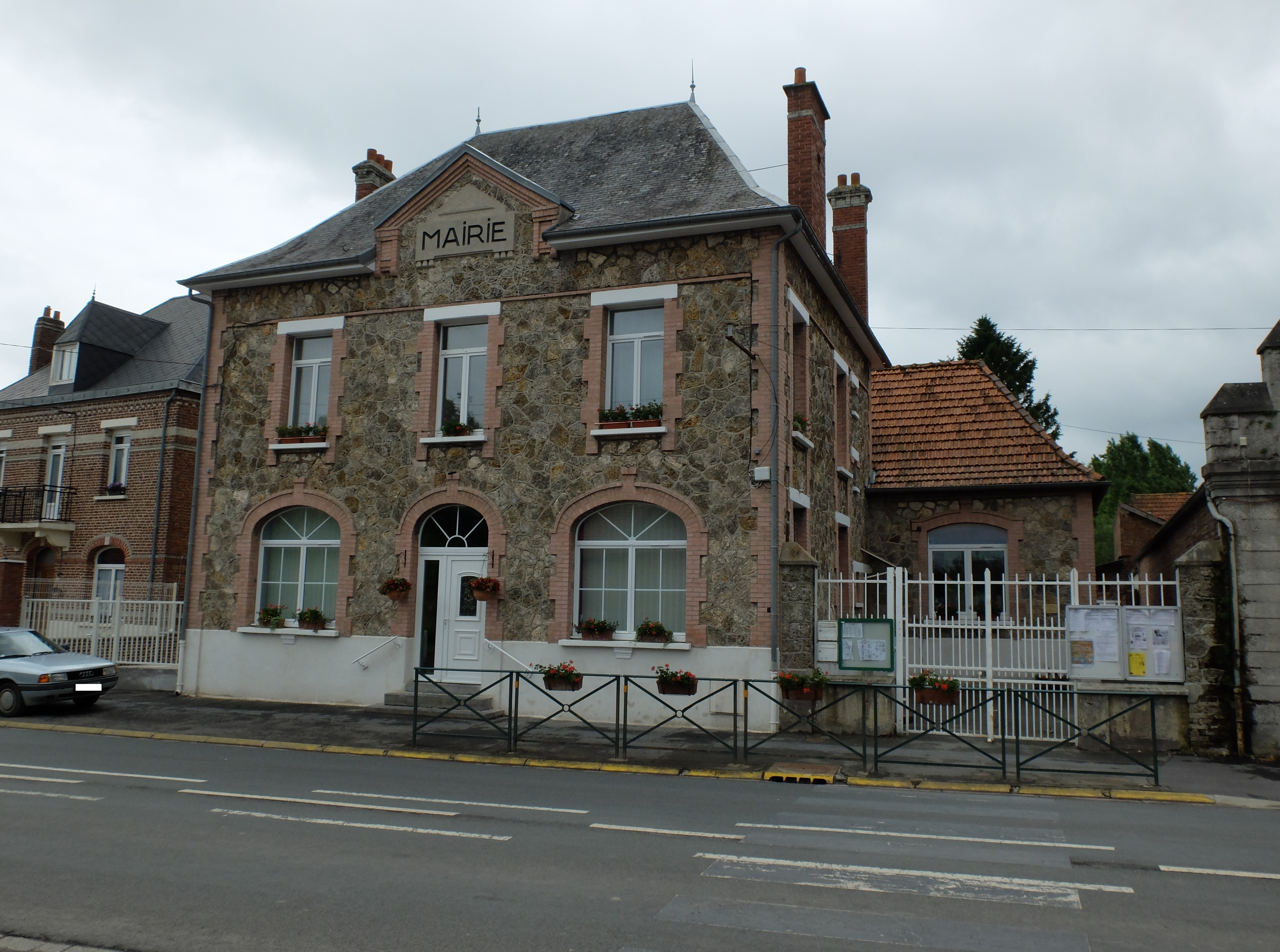 Vue de la mairie d'Hendecourt-lès-Cagnicourt.